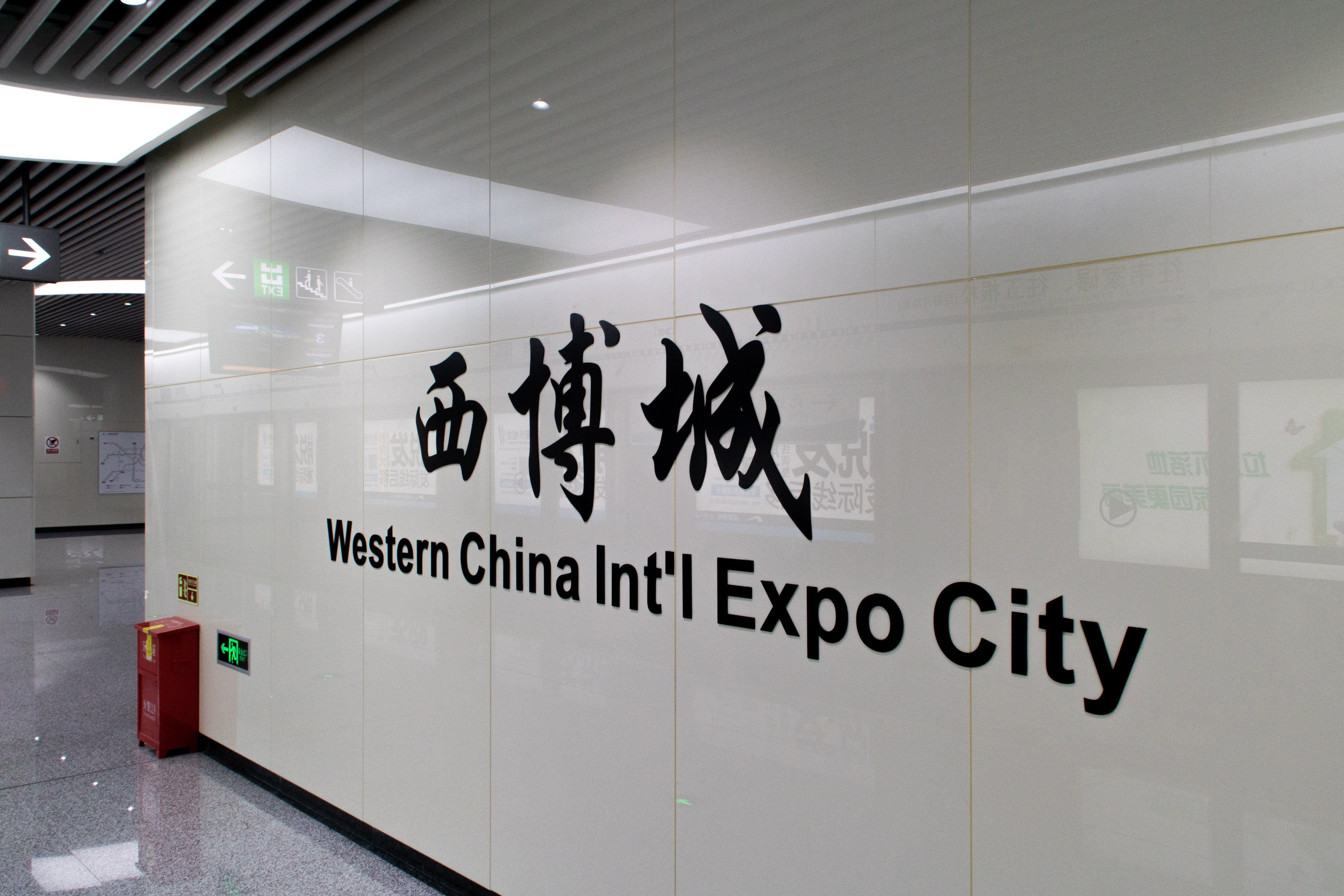 中文（中国大陆）: 西博城站站名壁